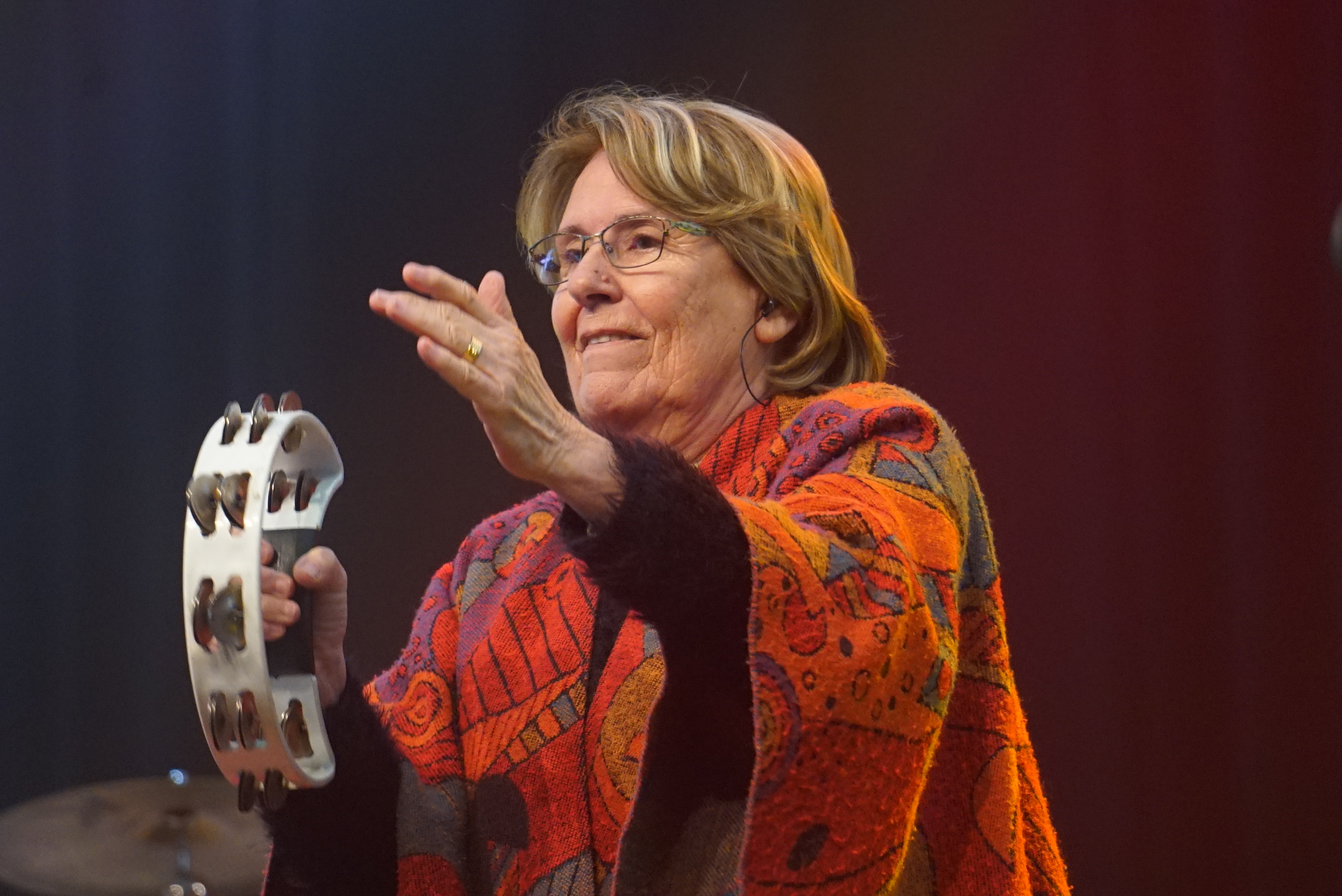 en concert lors du Centenaire de la bataille du Chemin des Dames.